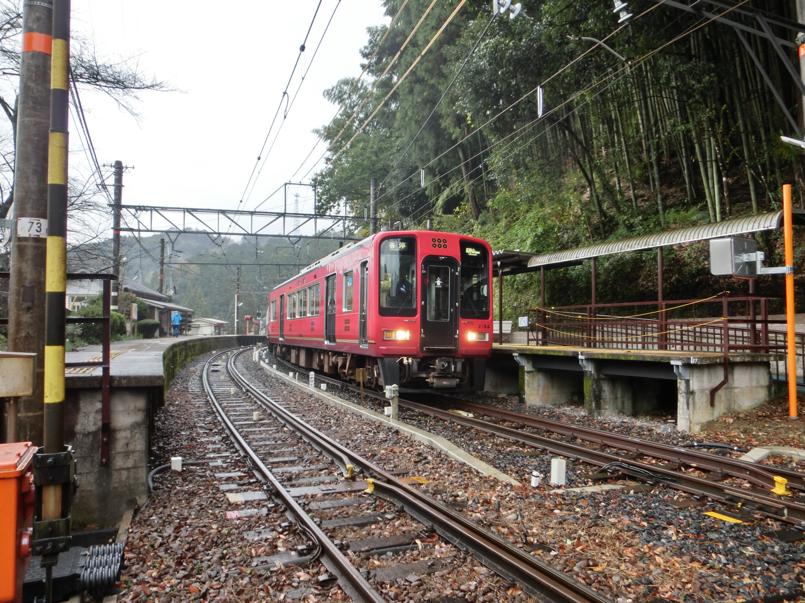 下古沢駅上下ホーム（極楽橋方）